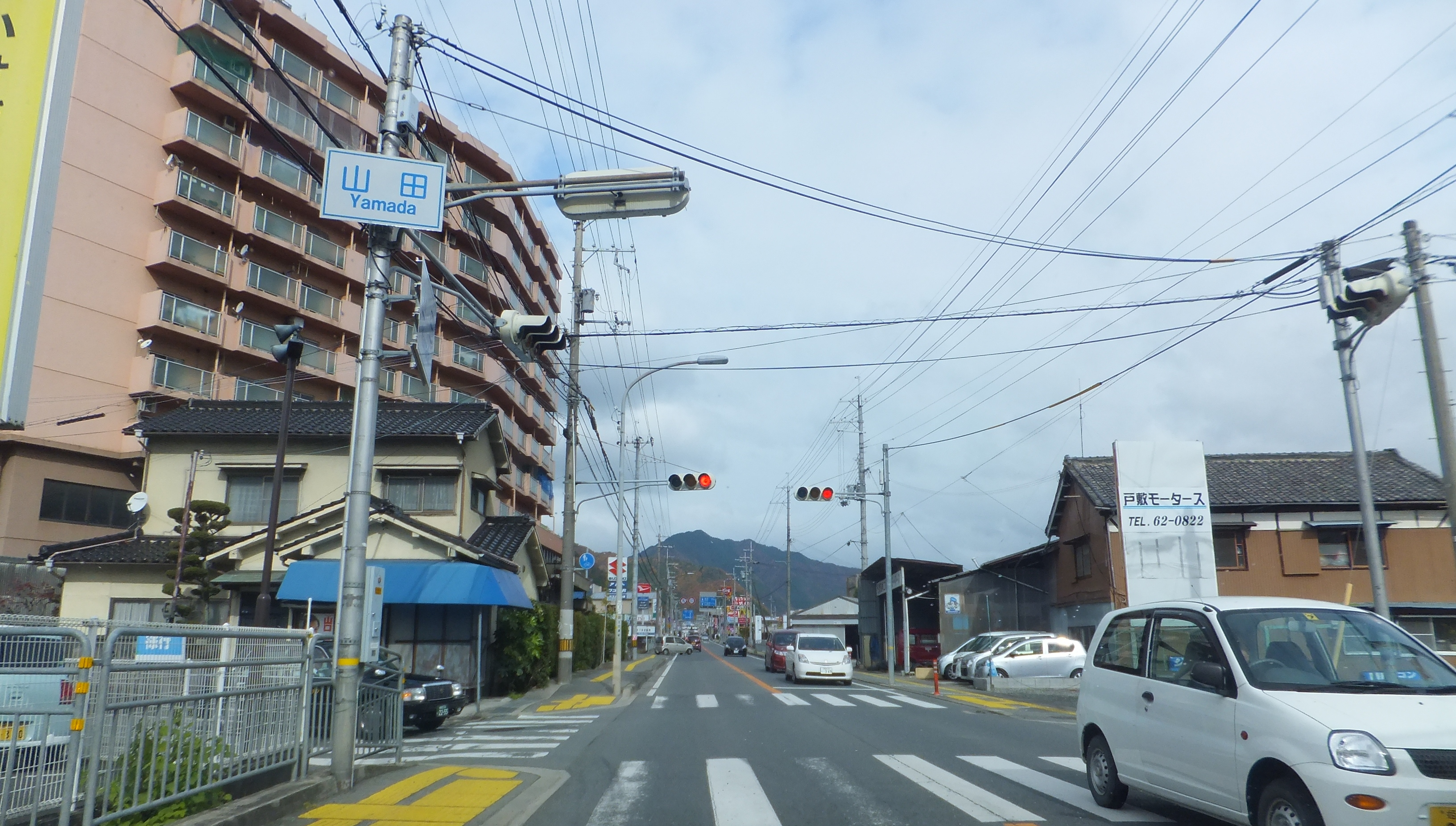 兵庫県宍粟市山崎町山田 国道29号